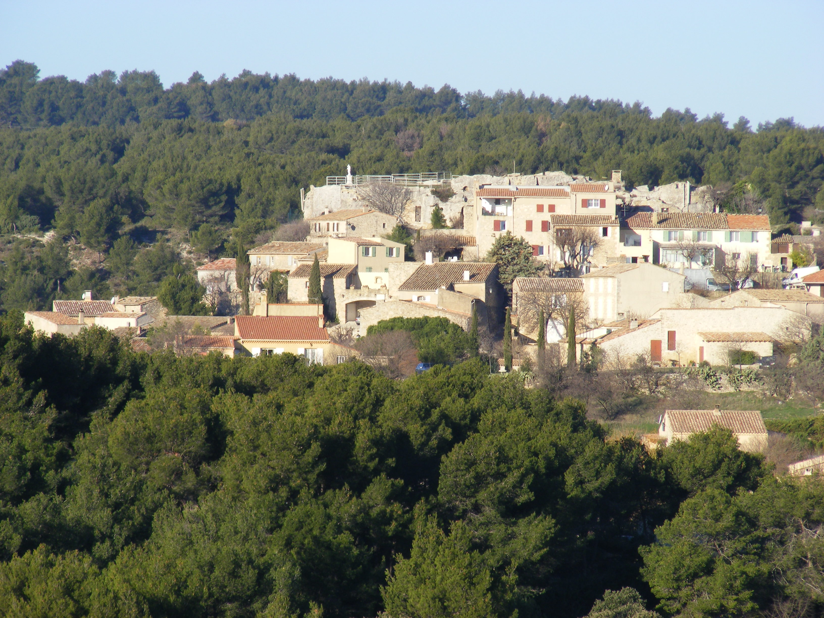 Vue d'Aurons Image prise par l'utilisateur Zeugme Nycthéméral le 14 janvier 2008